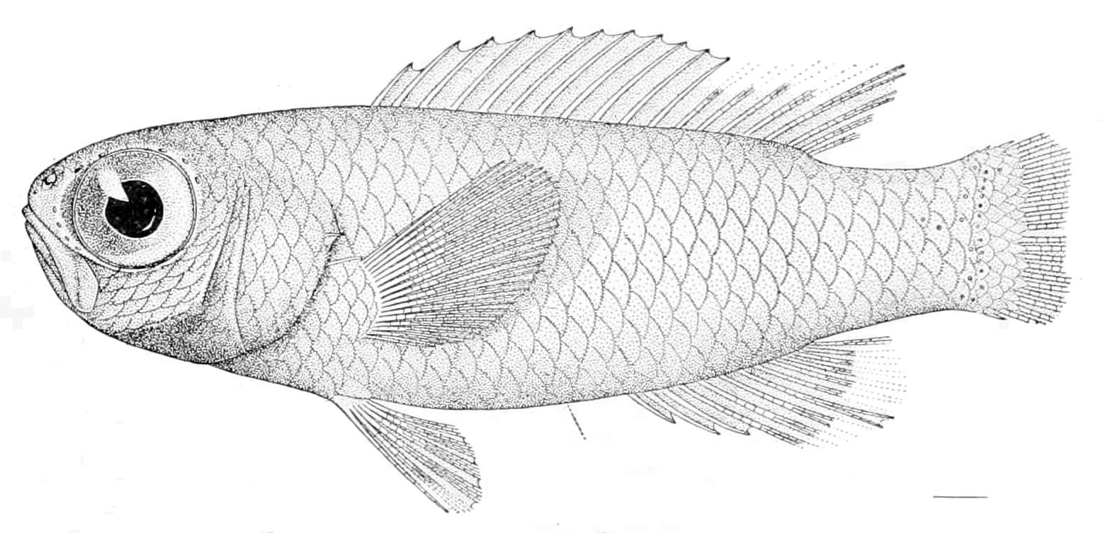 Grammatonotus laysanus